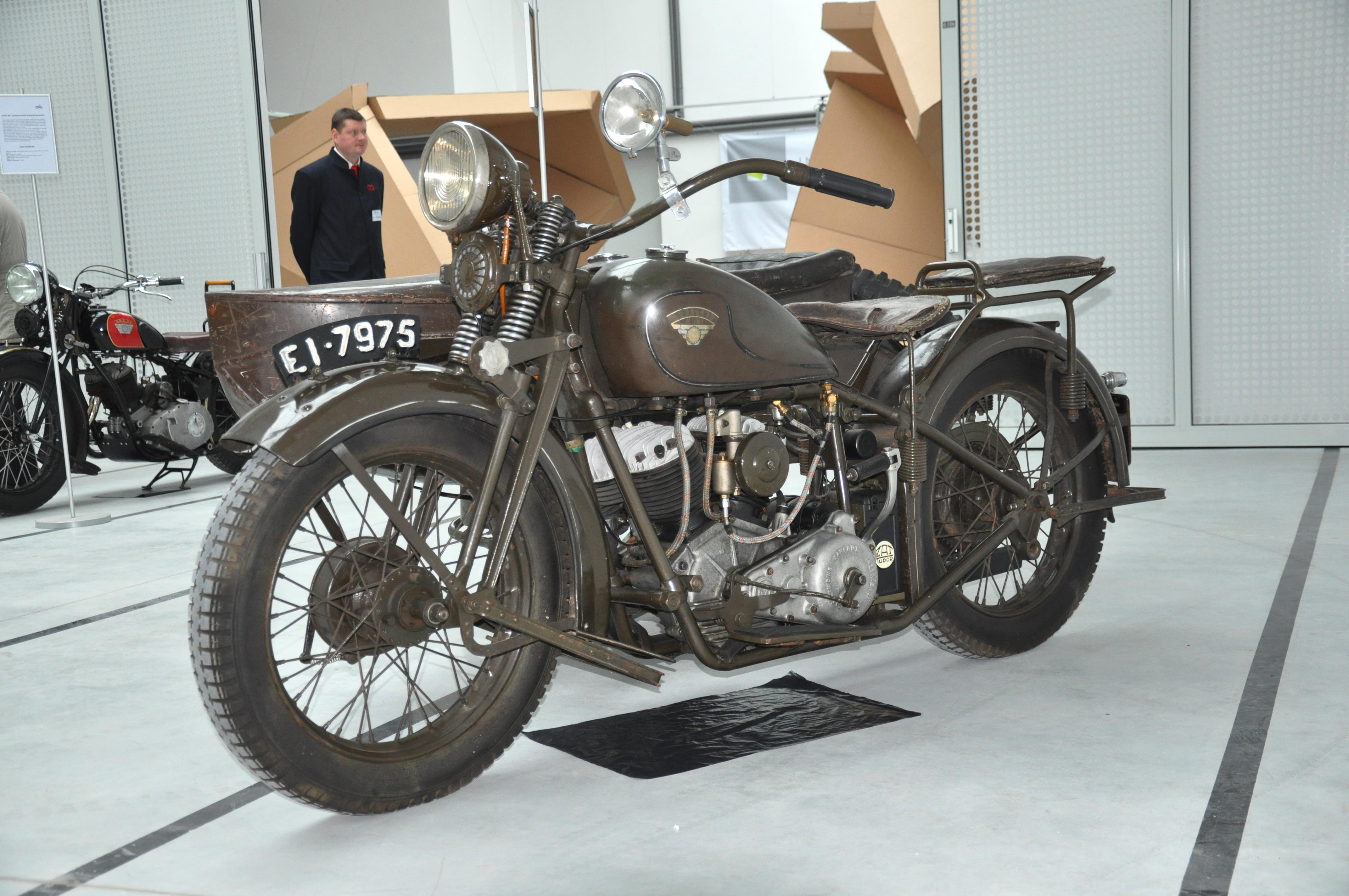 CWS M111 Sokół 1000 - Muzeum Techniki i Komunikacji w Szczecinie